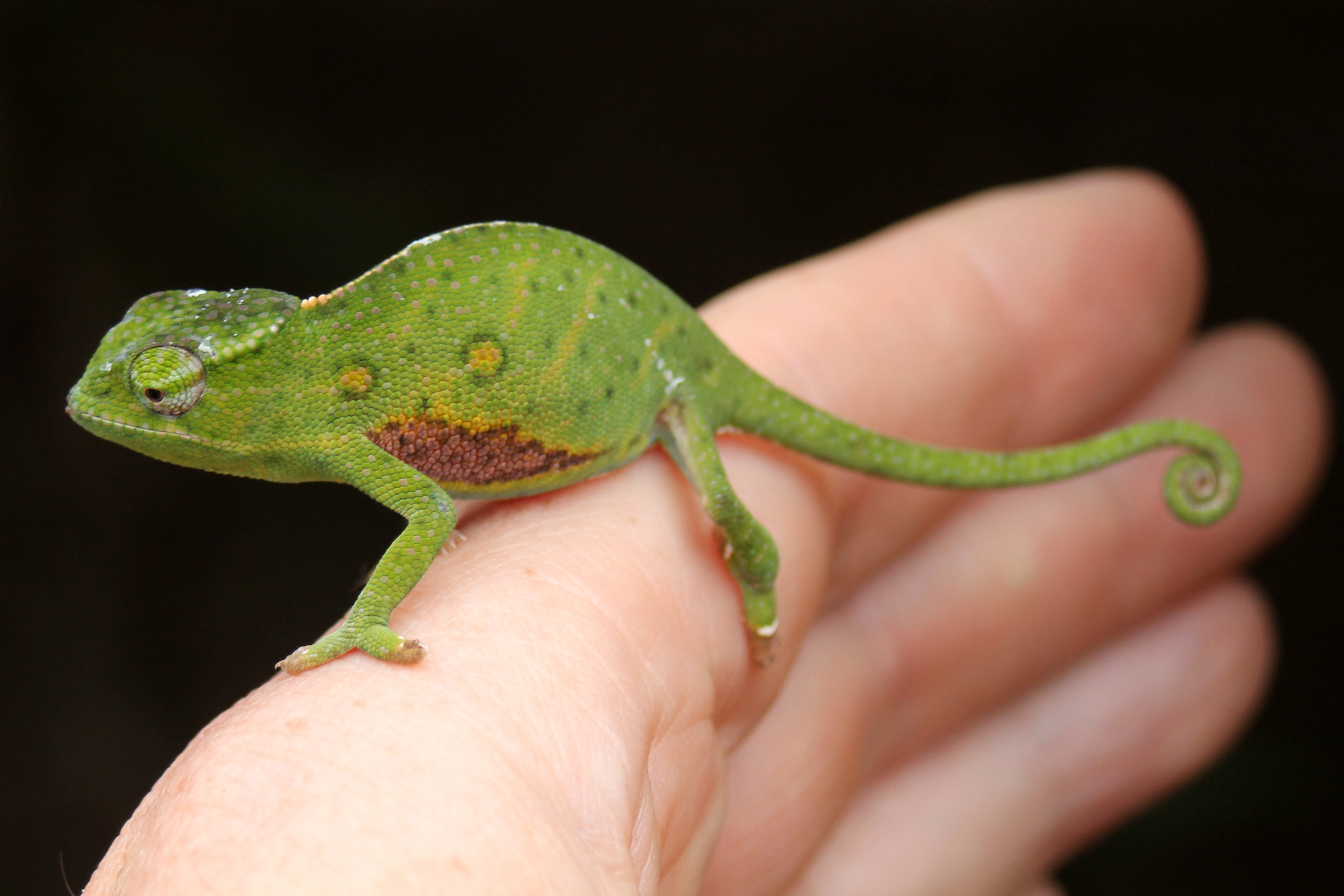 cameleon, peyrieras